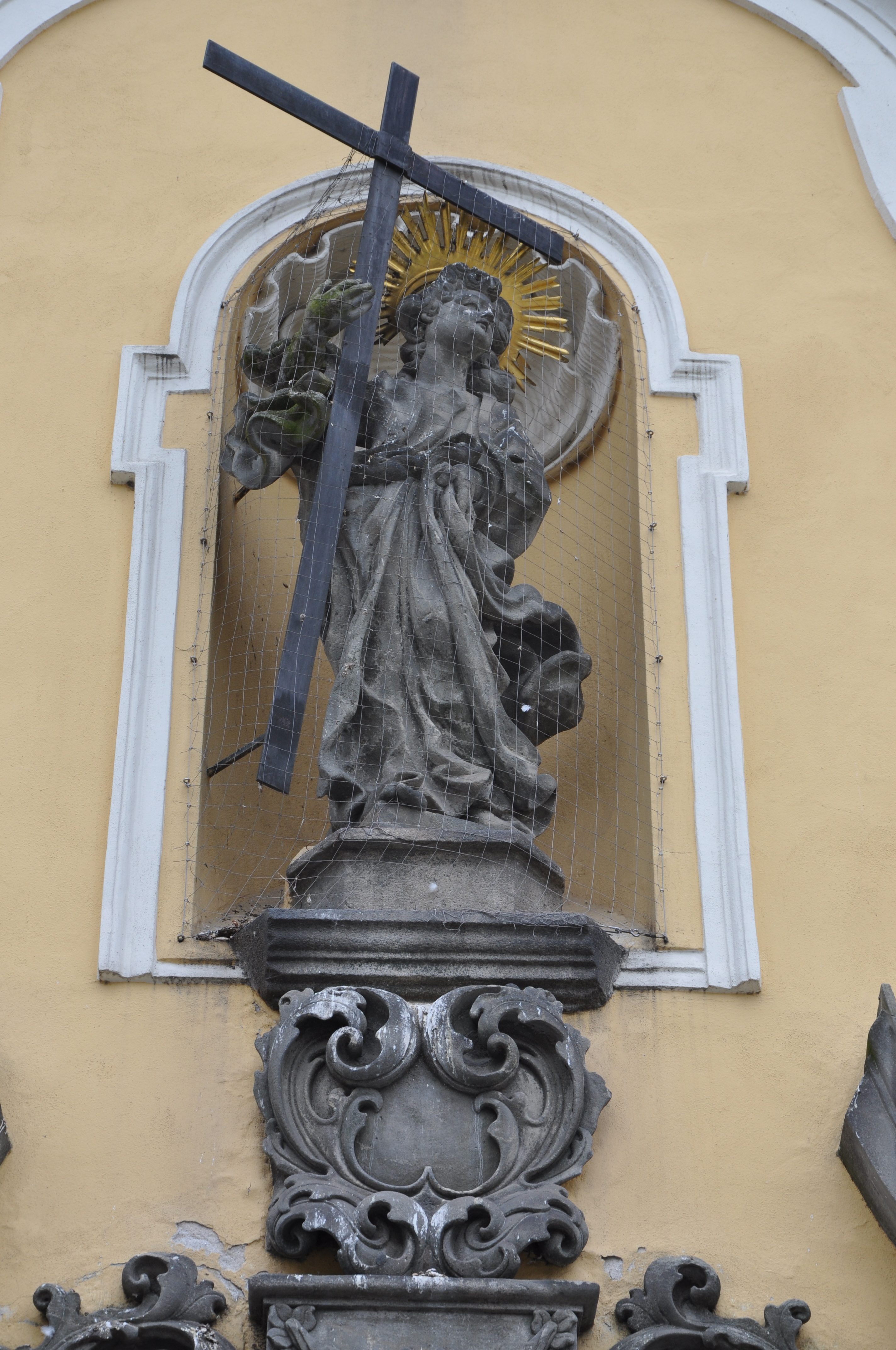 Sochy členů sv.Rodiny. Autorem projektu bratr Philipus - člen konventu pražského kláštera na Zderaze. Zde pracoval až do roku 1691,kdy přešel do německobrodského konventu (kde setrval až do smrti). Dílo bratra Philipuse - vytvoření soch členů sv.Rodiny, které dnes zdobí průčelí kostela. Knižní informace - název knihy Baroko na Havlíčkobrodsku (Publikace vychází k výstavě Baroko na Havlíčkobrodsku 23.května - 7.září 2014) strana 117. Druhá knižní informace - název Havlíčkův Brod a okolí str.35. Autor Jiří Sochr Marie Sochrová - Kostel sv.Rodiny (klášterní) - průčelí upraveno podle návrhu br.Filipa a Sancto Hermanno. Knihy k zapůjčení v Krajské knihovně Havlíčkův Brod. Informace nastudoval Pohled 111. Klášterní kostel svaté Rodiny. Ulice P.F. Ledvinky a ulice B. Kobzinové. Havlíčkův Brod. Kraj Vysočina. Czech Republik.